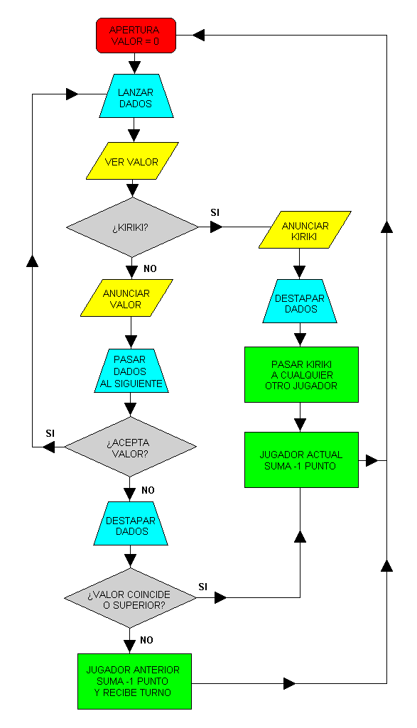 Kiriki (juego). Diagrama de flujo básico.